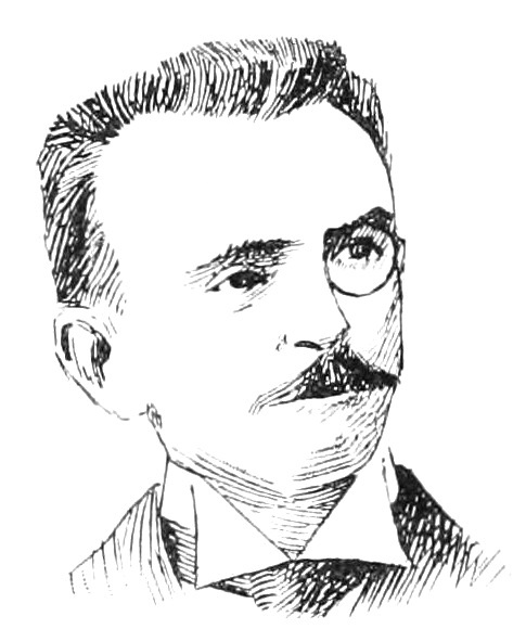 "La Nouvelle Chambre" : "Xavier Reille".